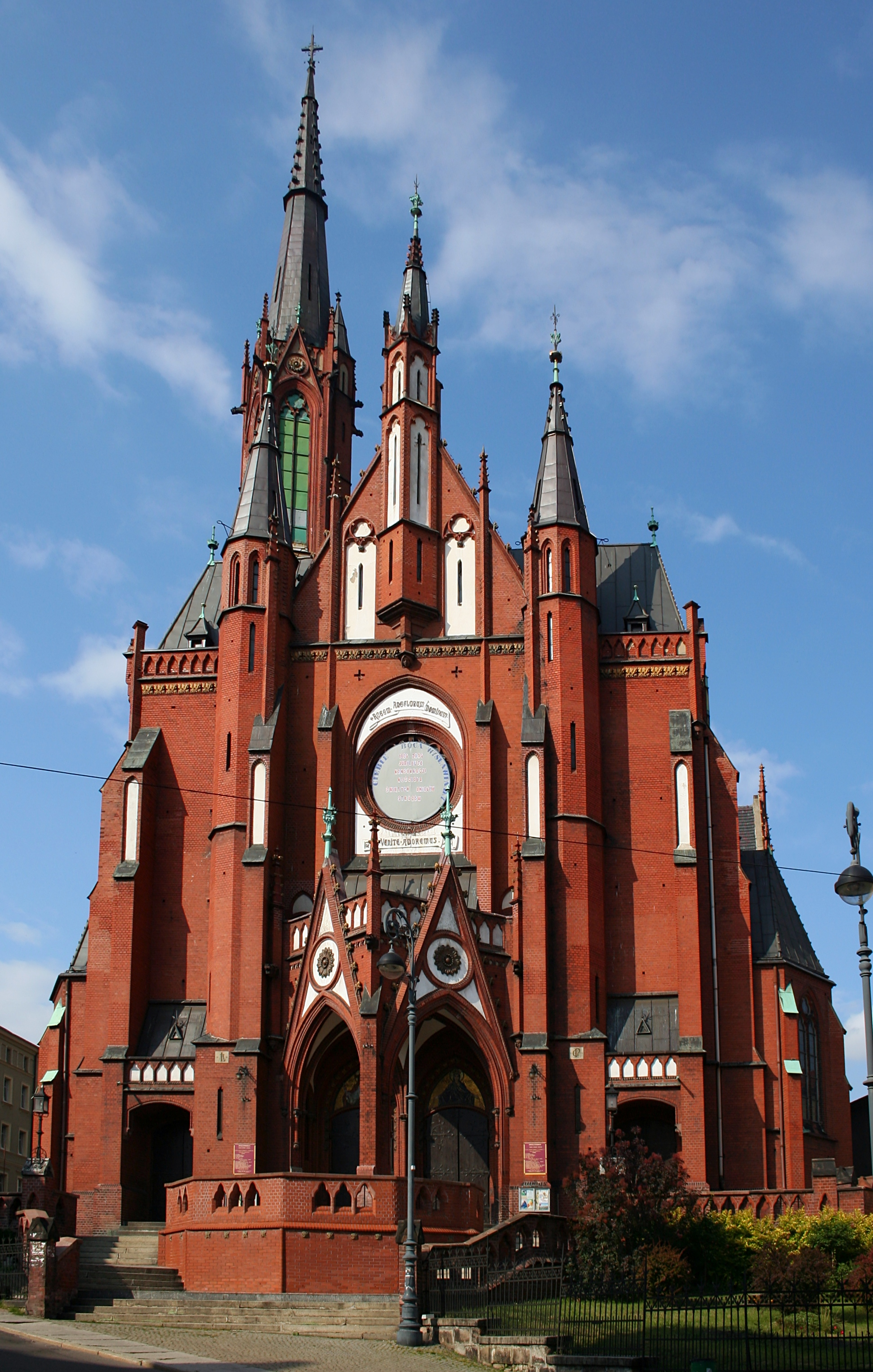 Kościół Najświętszej Maryi Panny Bolesnej i św. Aniołów Stróżów w Wałbrzychu.